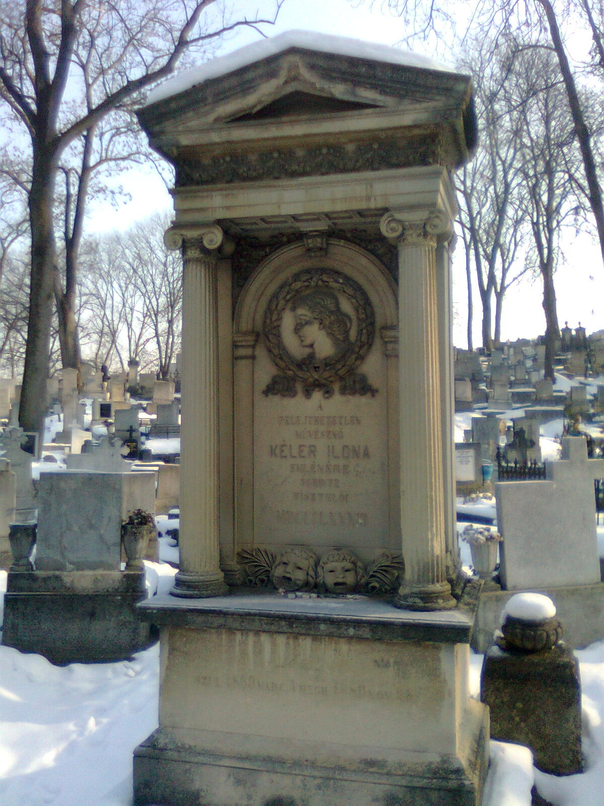 Kéler Ilona (1860-1880) erdélyi színésznő klasszicista sírja a Házsongárdi temetőben